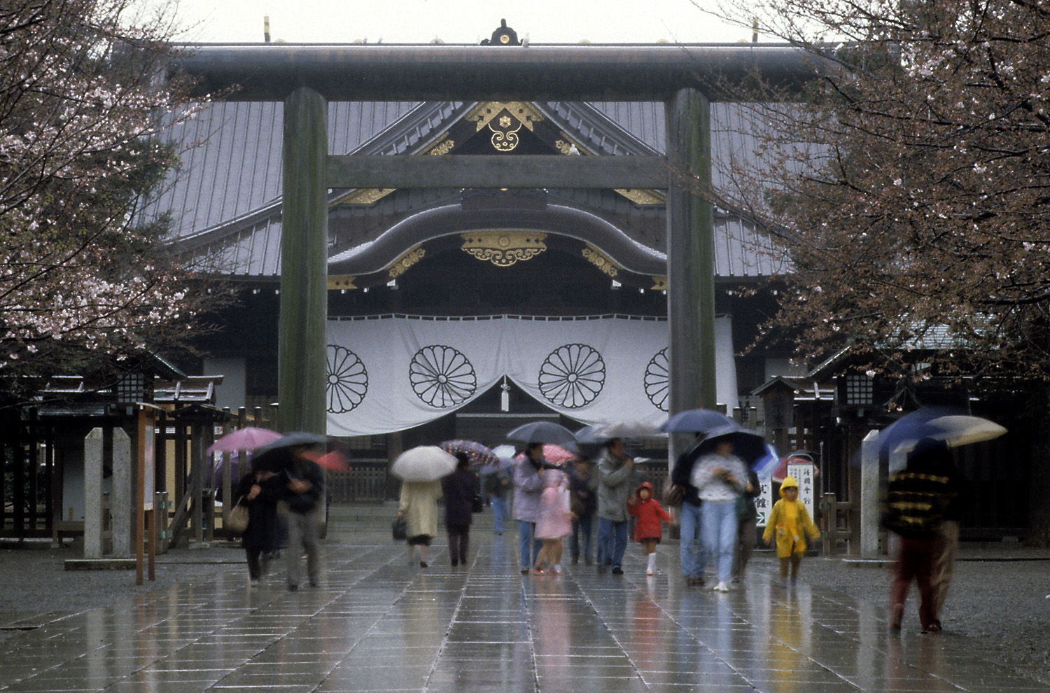 Yasukuni Shrine, Chiyoda, Tokyo, Japan